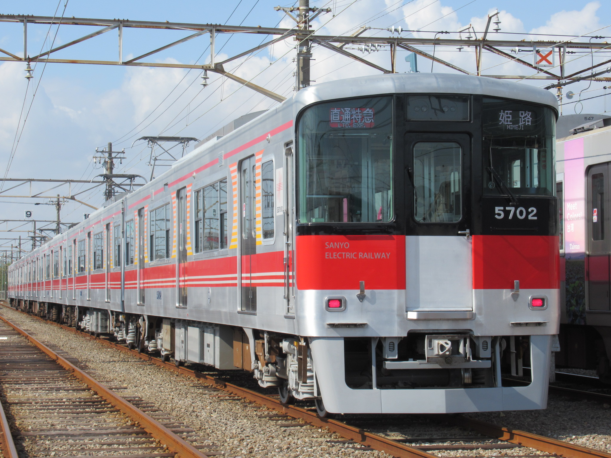 山陽電気鉄道 5000系リニューアル車 （東二見車庫イベント時撮影）